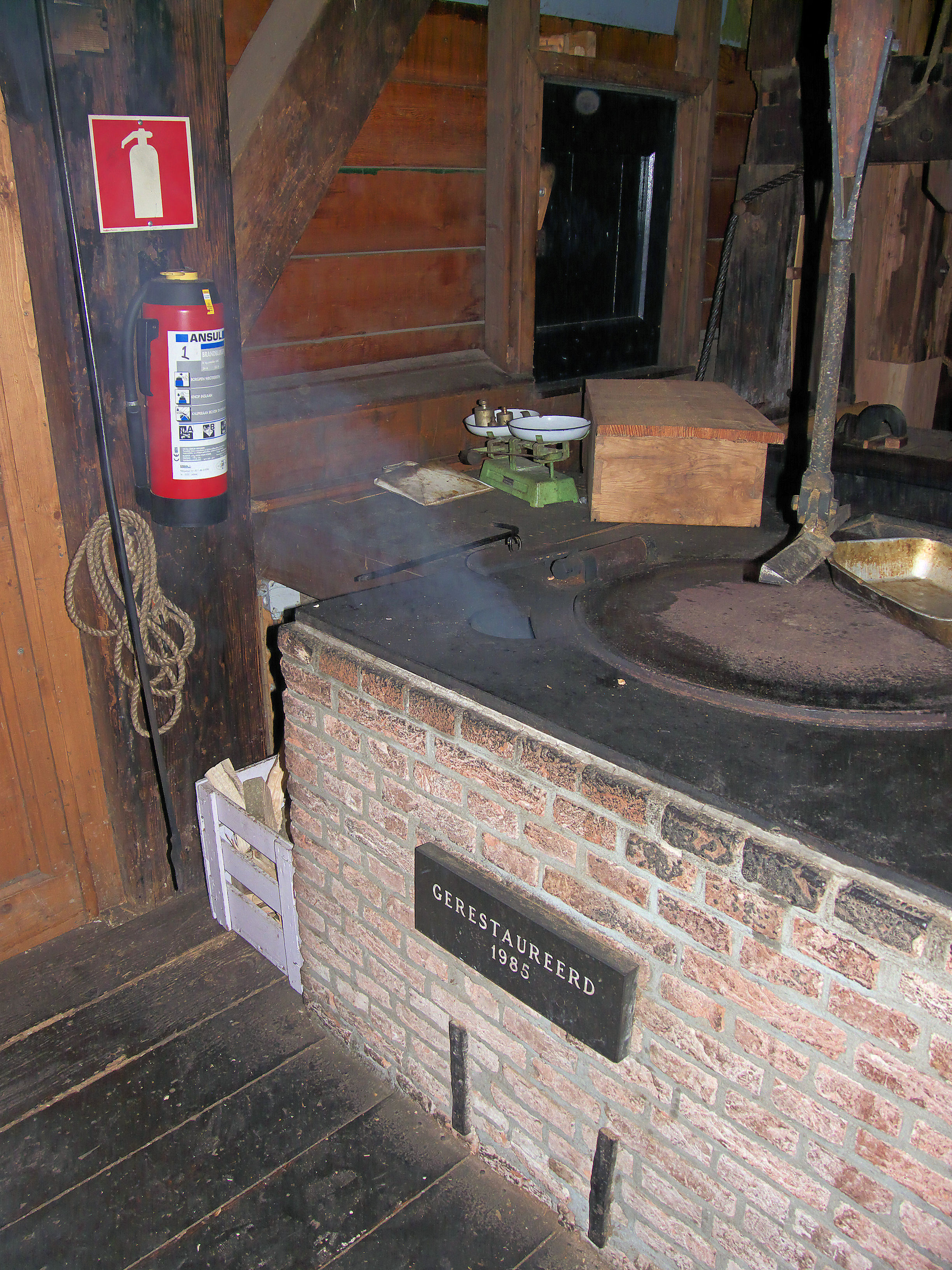 Molen De Passiebloem vuister voorslag brandend